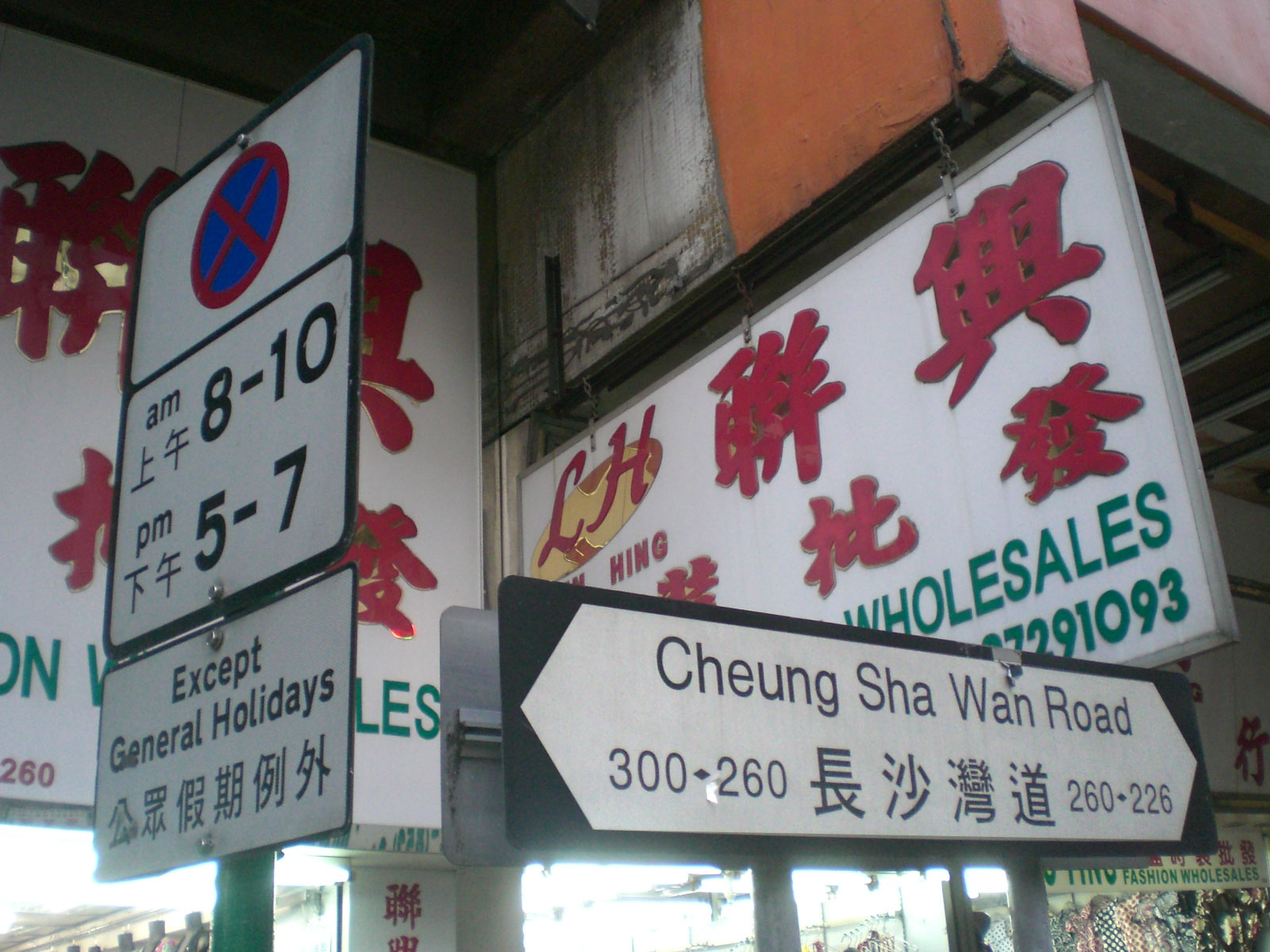 深水埗長沙灣道近香港地鐵深水埗站, Cheung Sha Wan Road, Kowloon, Hong Kong.